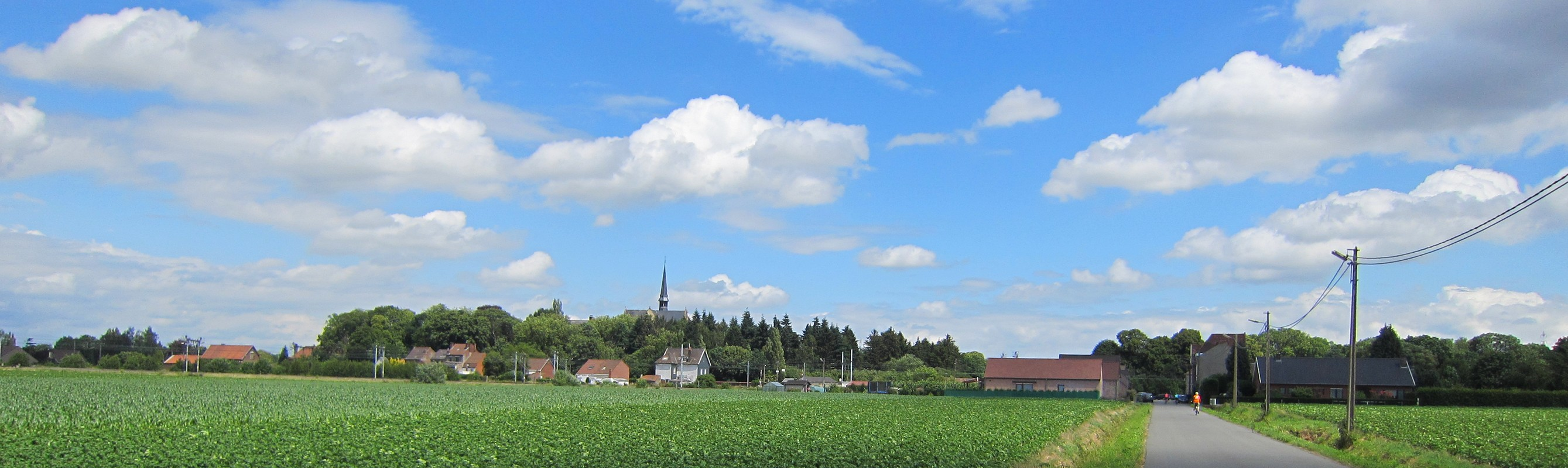 Froyennes